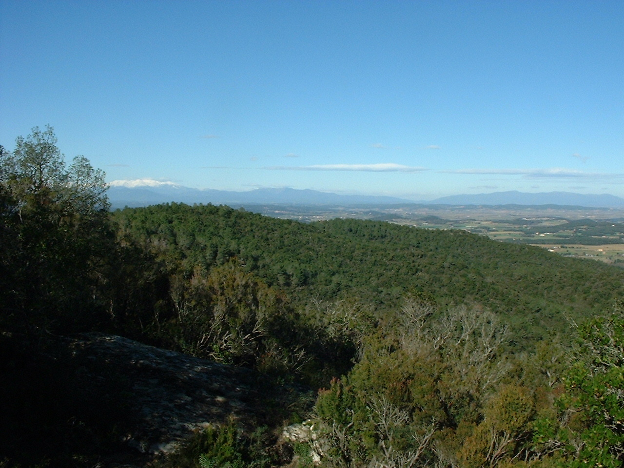 Gavarres mountains, Empordà, Catalonia